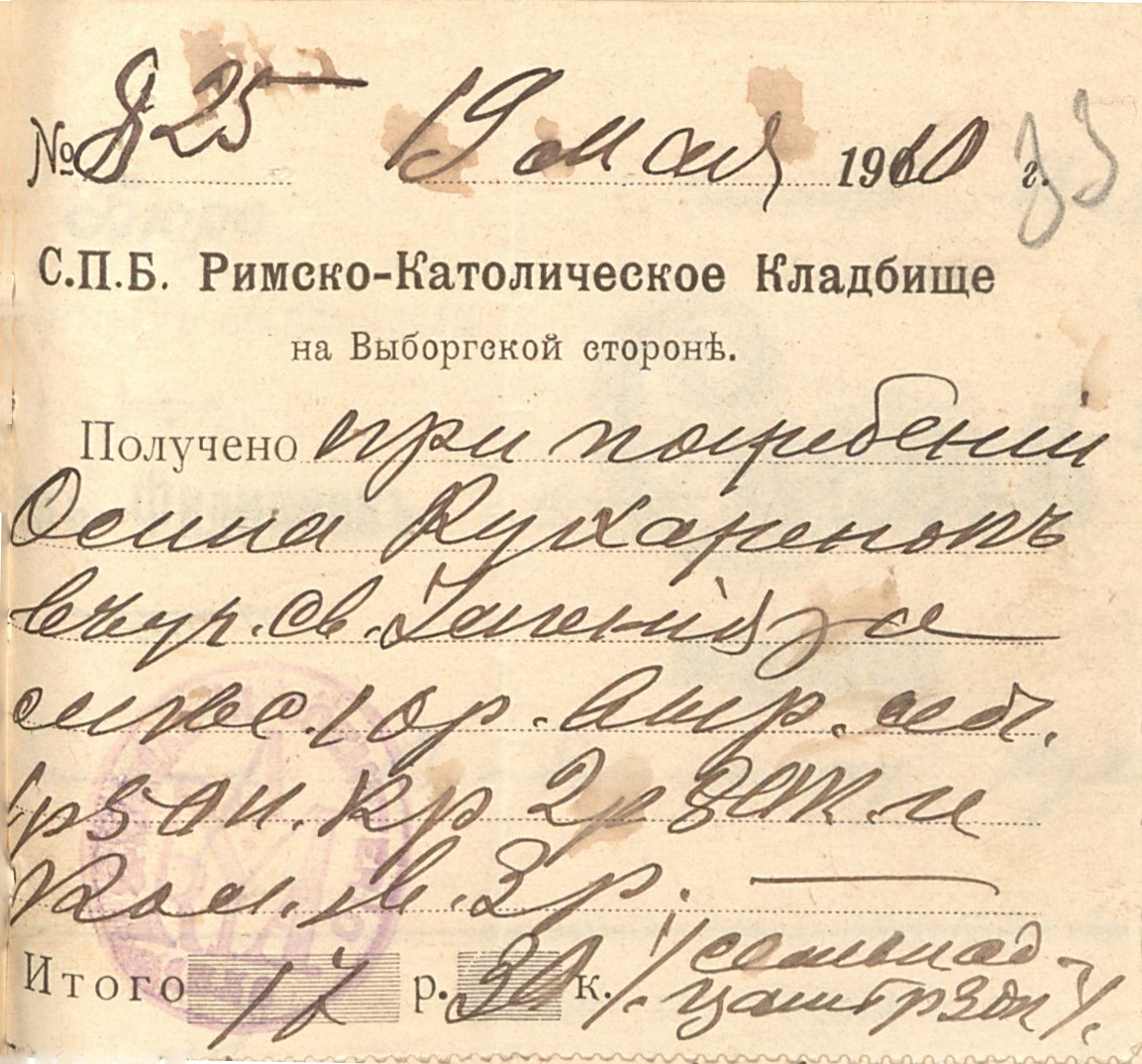 Квитанция Римско-католического кладбища, 1910 год.